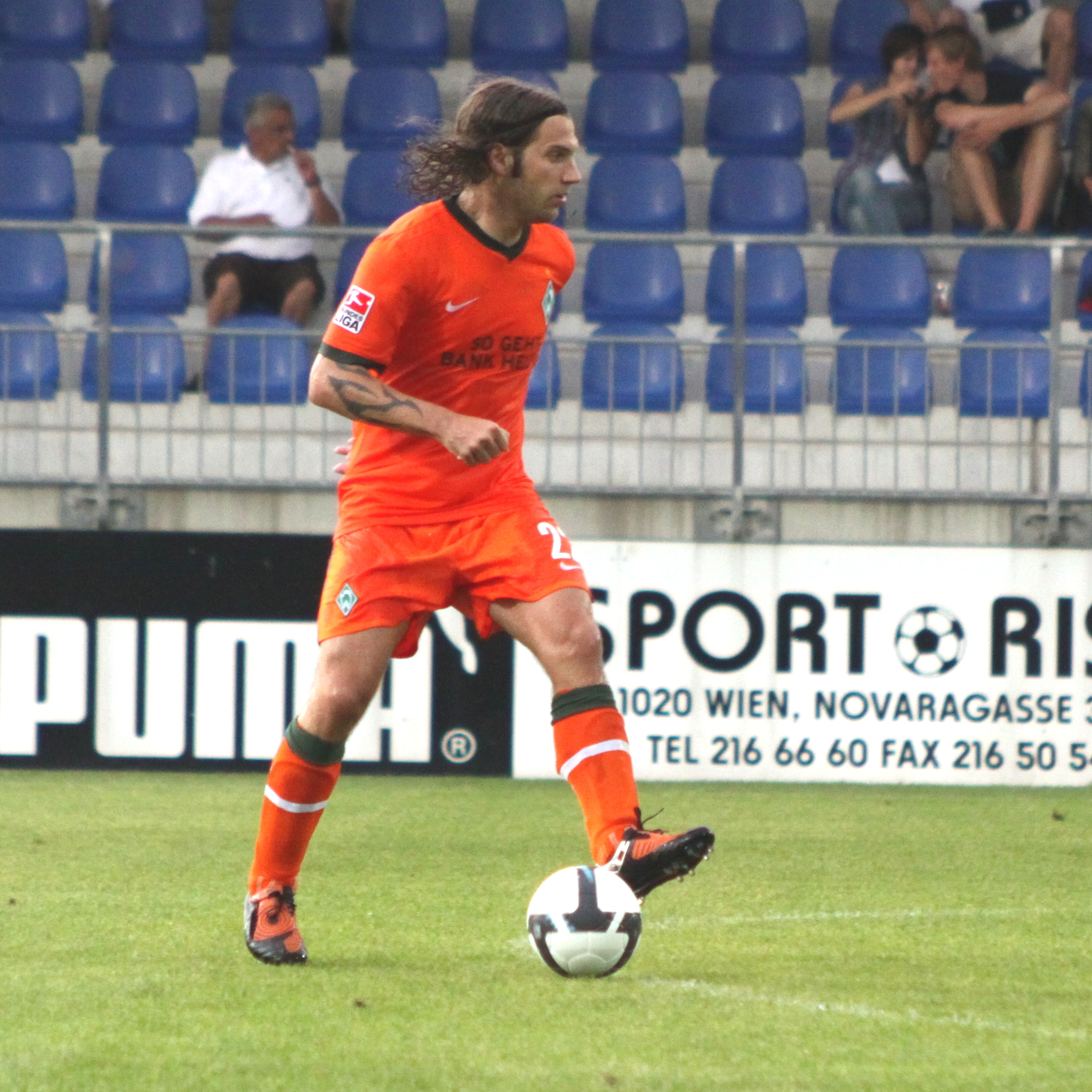 Torsten Frings - SV Werder Bremen (5)